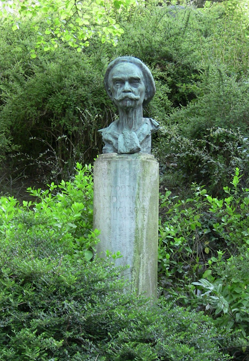 Statue de l'horloger-poète Louis Duplain, à Besançon (Doubs, France).